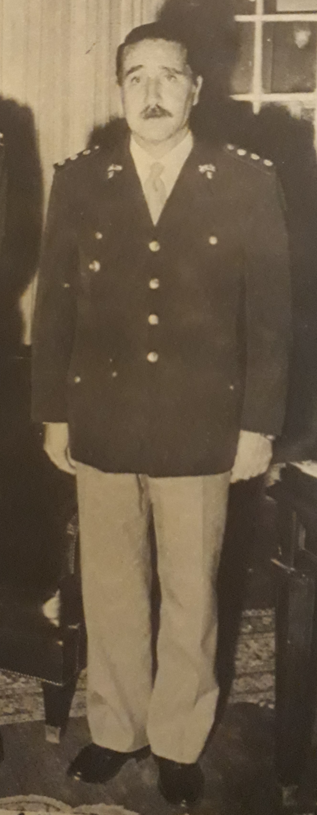 vicente damasco